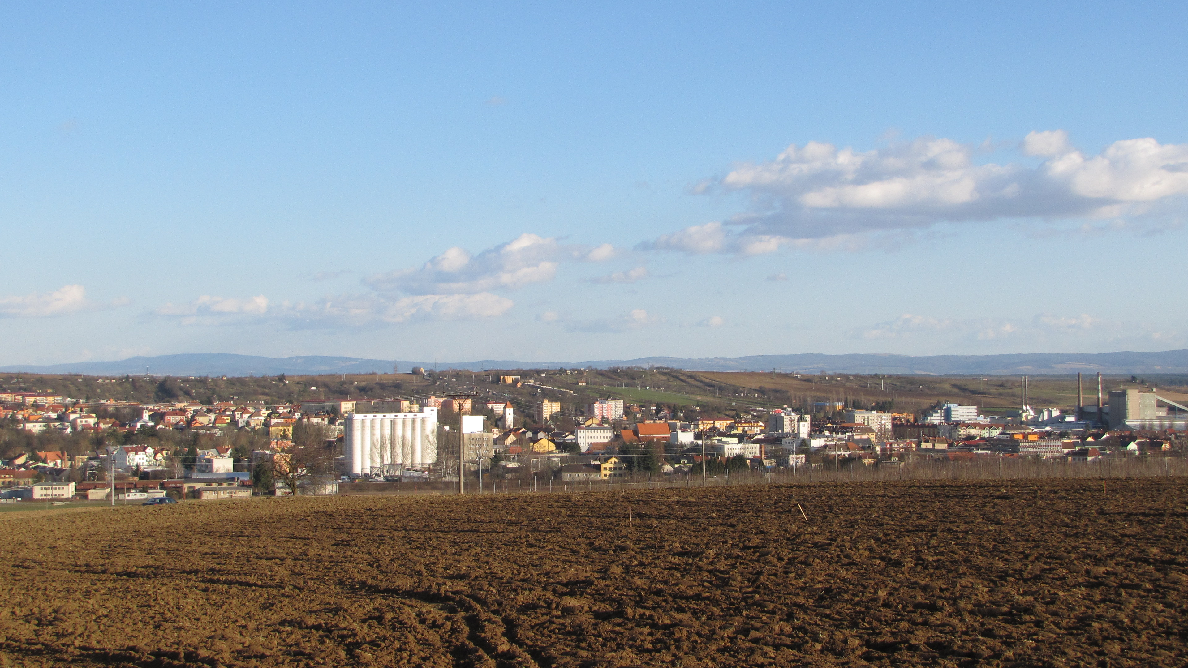 Pohled na Kyjov od severozápadu z rozcestí "U Kohútka". V pozadí hřeben Bílých Karpat.